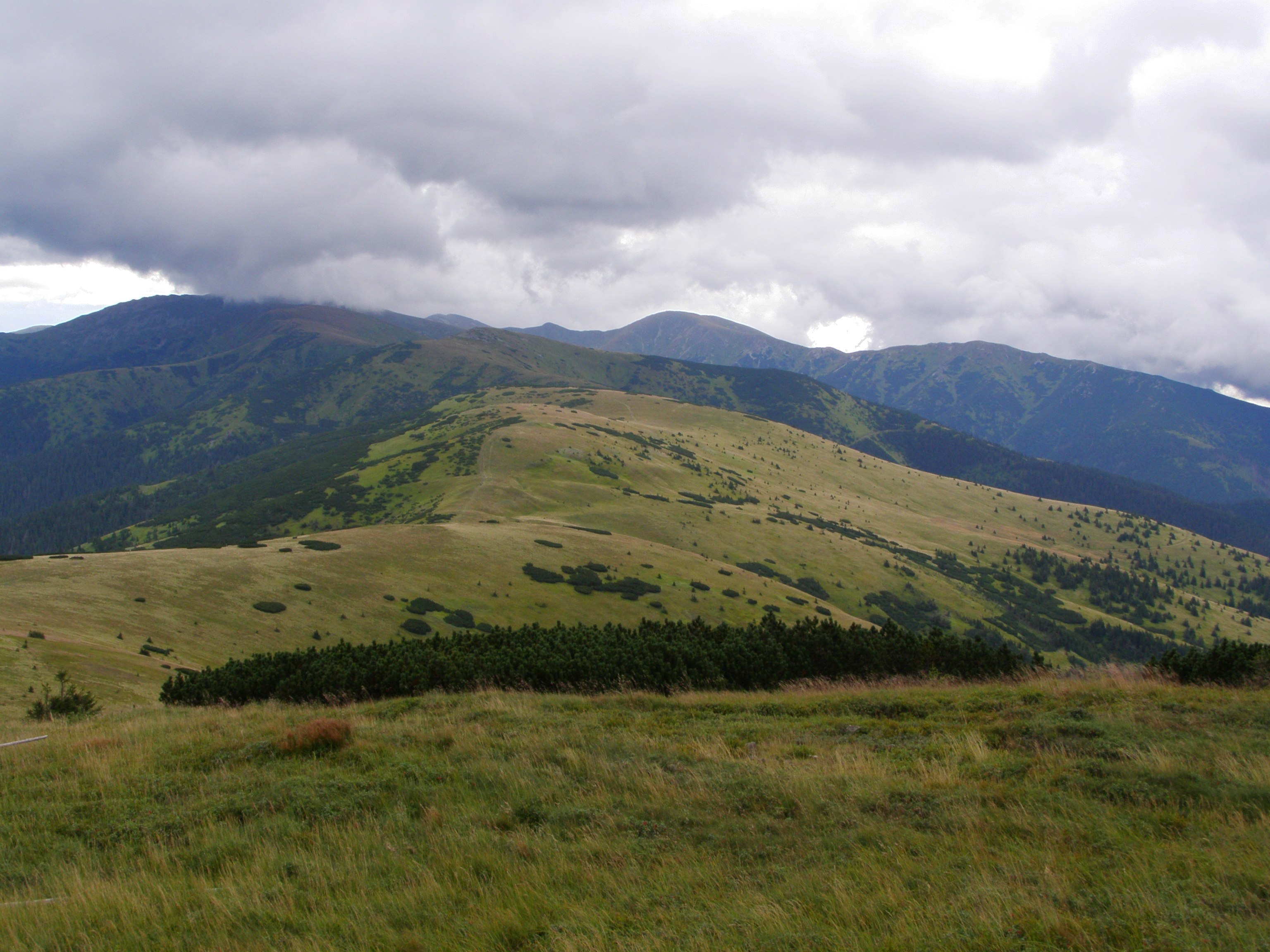 Nízké Tatry, Ďumbierské Tatry, výhled z vrcholu Latiborská hoľa (1643 m) na východ: v popředí Zámostská hoľa (1612 m), za ní Ďurková (1750 m), vzadu nalevo mírně v mracích Chabenec (1955 m), vzadu uprostřed Skalka (1980), vzadu napravo Žiarska hoľa (1841)